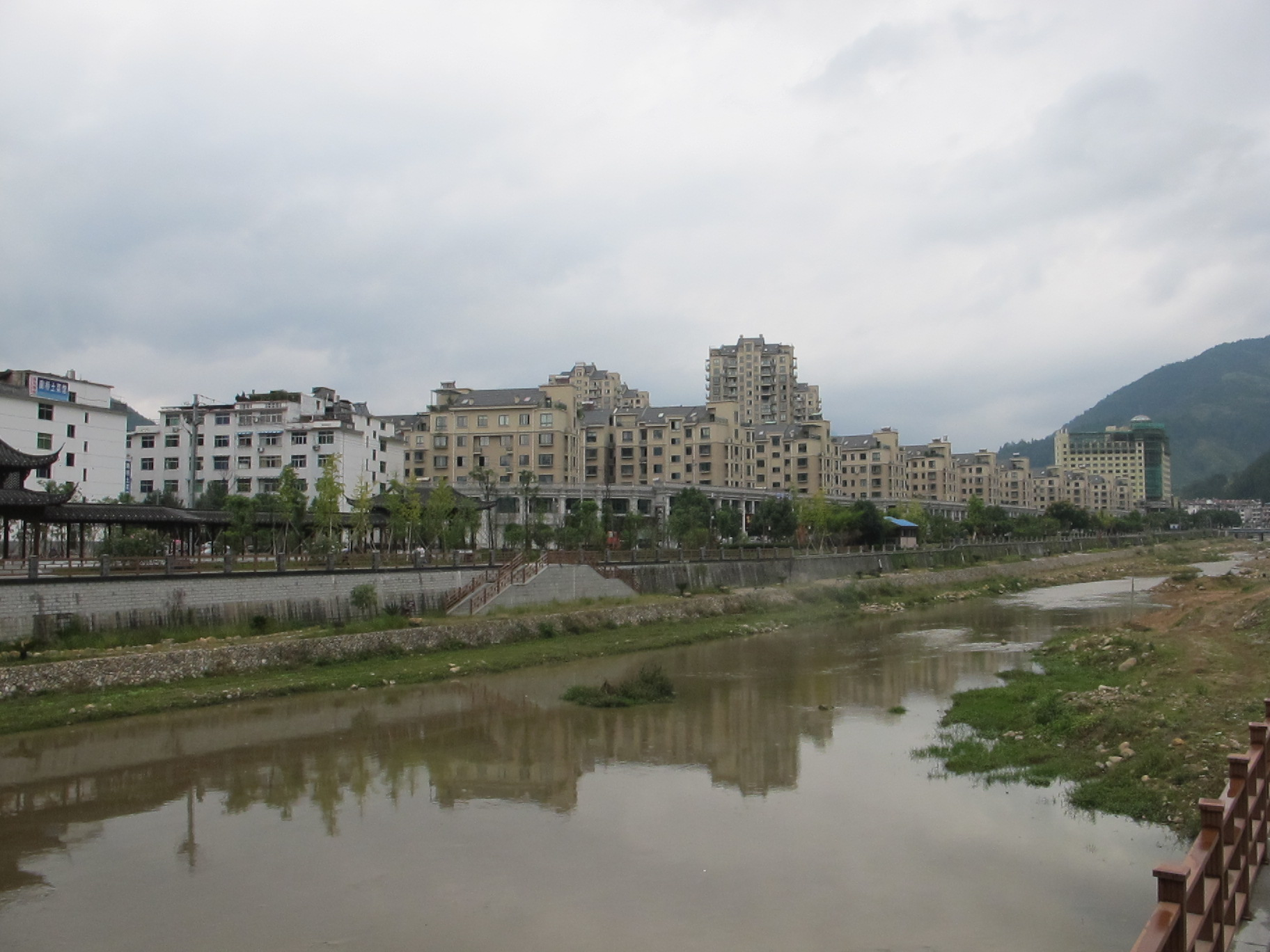 景宁县城全景